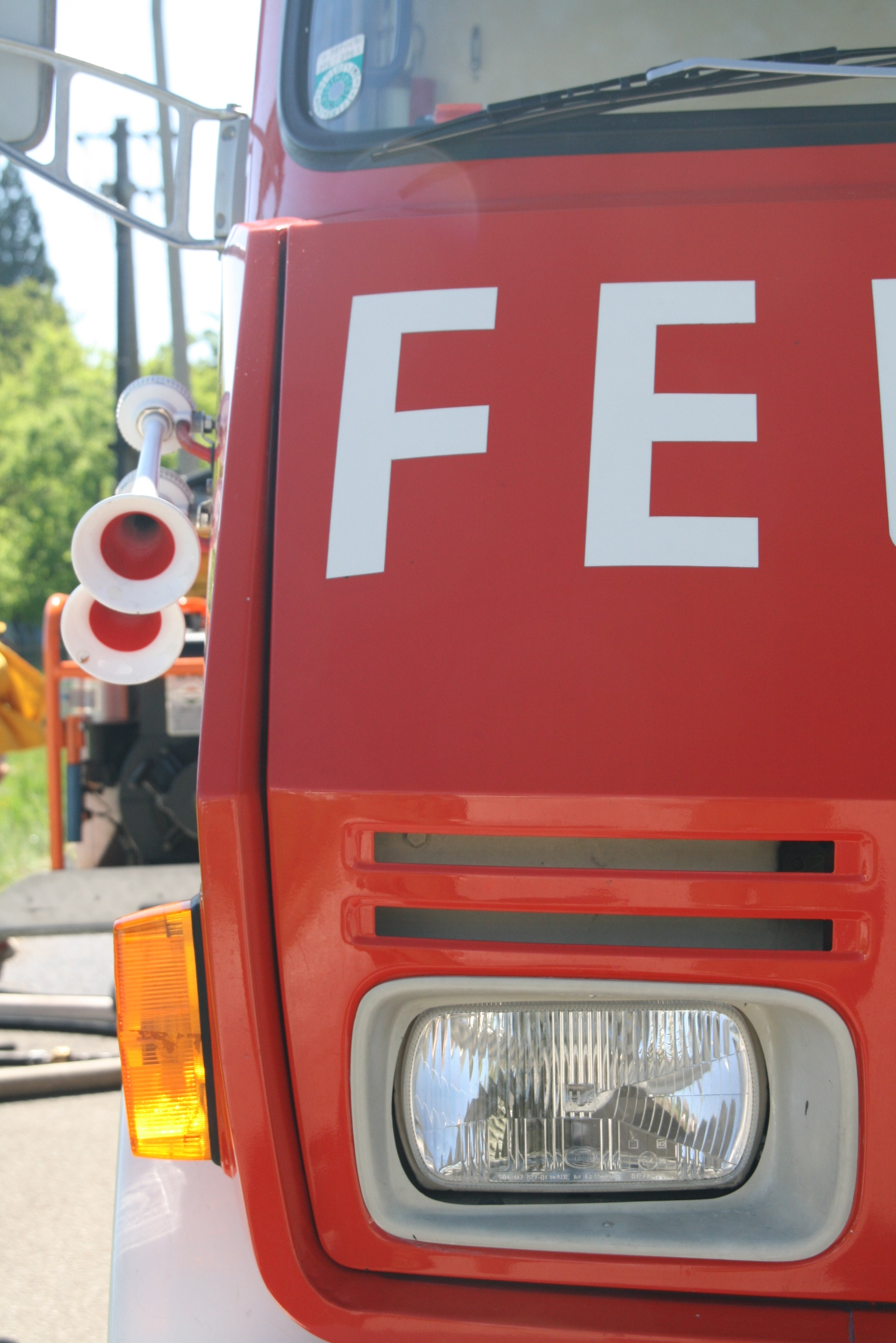 Blast siren / Pressluft Folgetonhorn